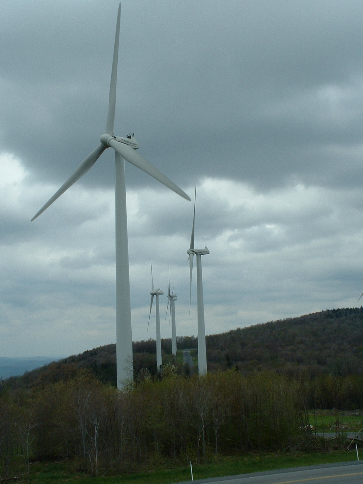 Wind Farm in Tucker County, West Virginia, USA